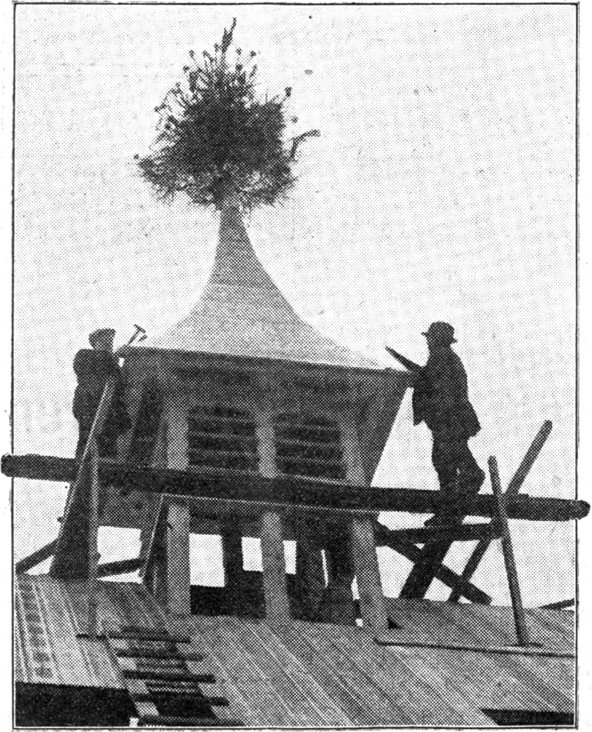 NAAR OUD LIMBURGSCH GEBRUIK wordt op een in aanbouw zijnd huis, dat tot den nok is opgetrokken, een zgn. Meiboom geplant door het werkvolk, dat daarvoor een tractatie ontvangt. De „Meiboom” op het Dr. Cuypers-Museum te Roermond. Afkomstig uit het Algemeen Handelsblad, dinsdag 19 januari 1932, eerste blad, [p. 4].